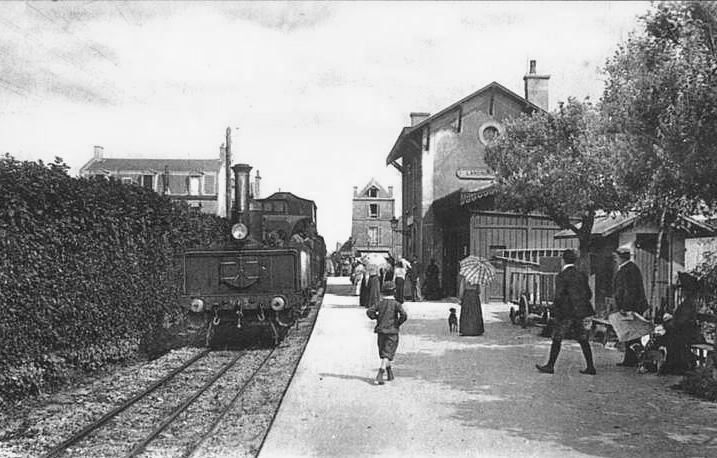 Train en gare de Langrune avec le troisième rail posé en 1900 pour les Chemins de fer du Calvados